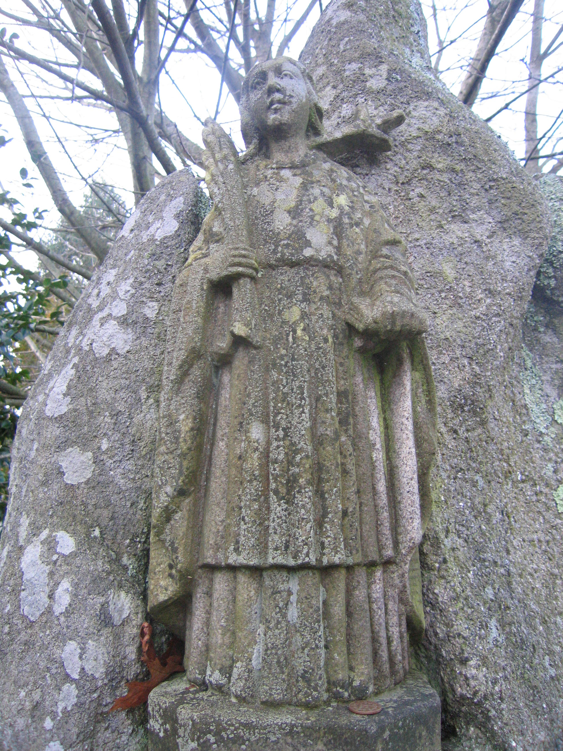 Imagen de Santa Comba de Bértola en Vilaboa